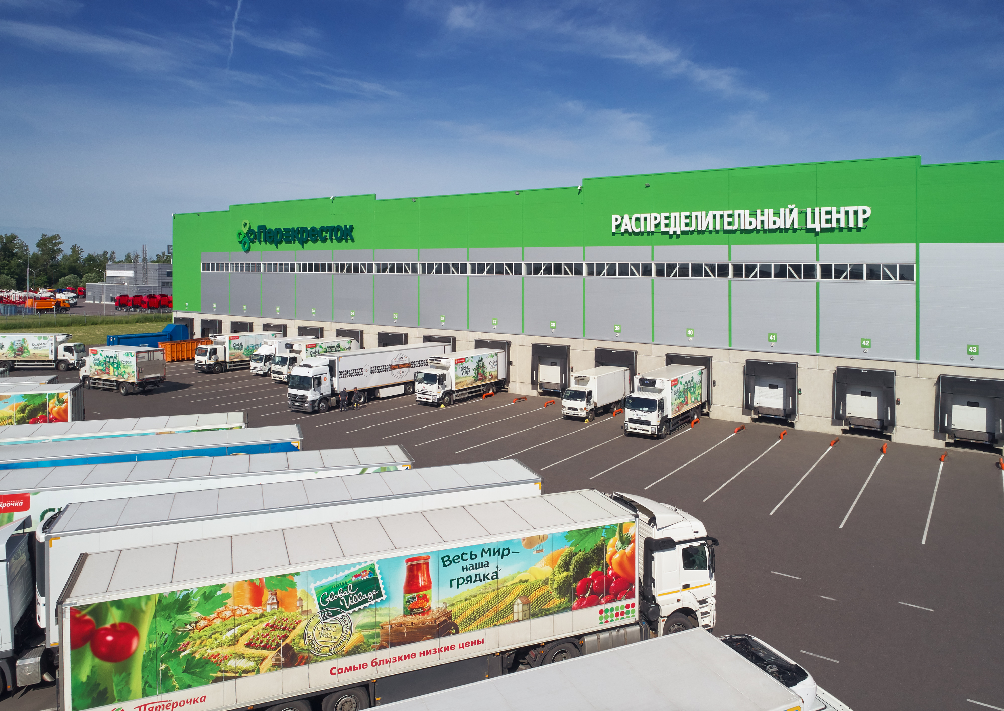 Распределительный центр X5 Retail Group в Шушарах (Санкт-Петербург), который обслуживает торговые сети больших форматов «Перекрёсток» и «Карусель» в Северо-Западном федеральном округе